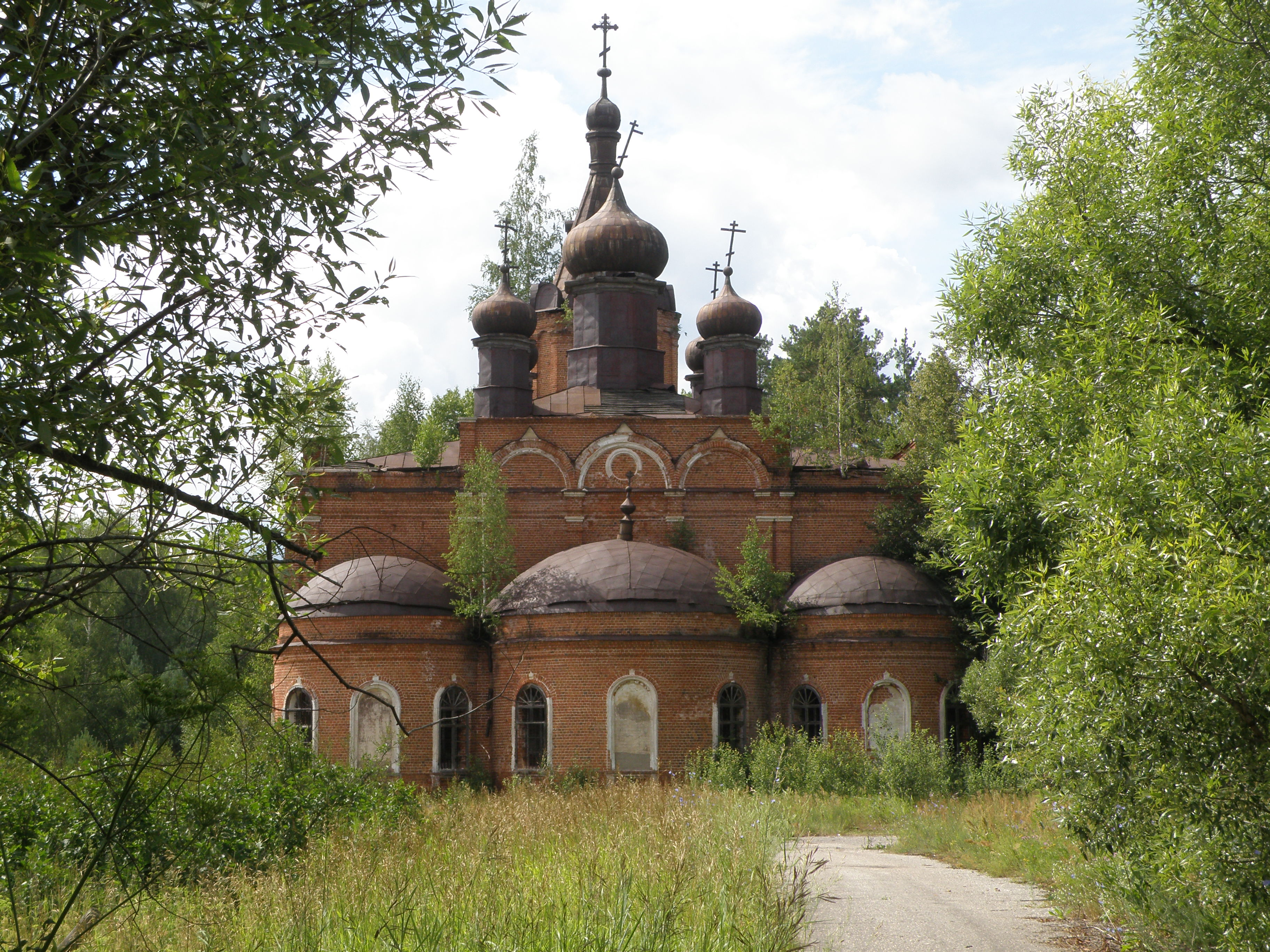 Церковь в с. Нарма, вид с востока